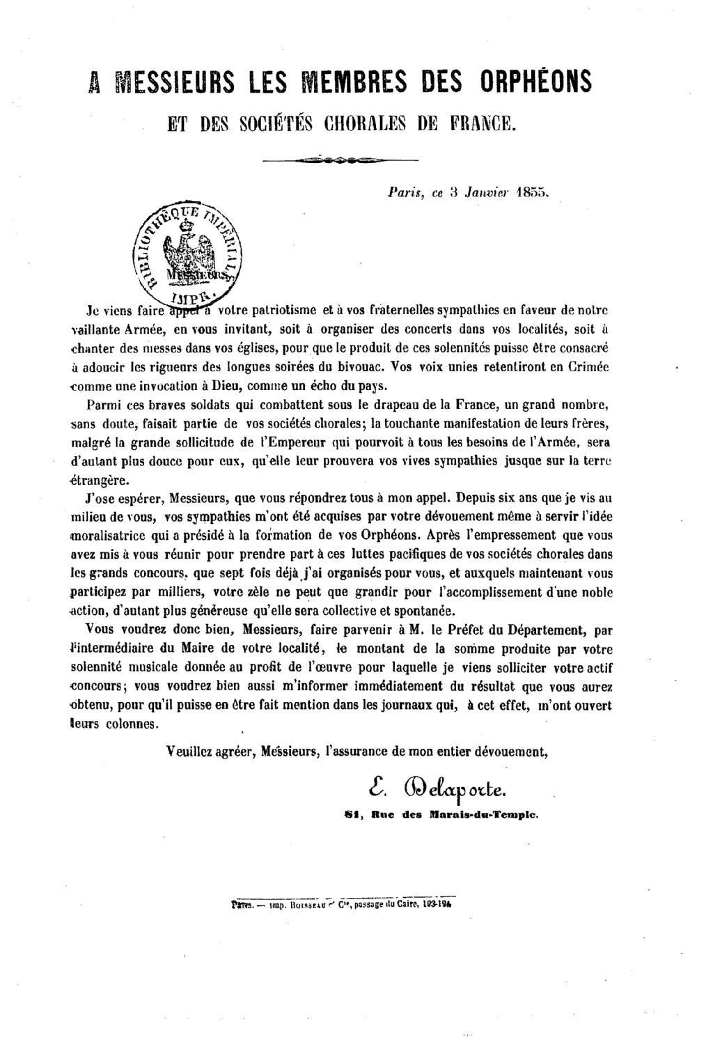 Lettre aux membres des orphéons et sociétés chorales, document copié sur la base Gallica